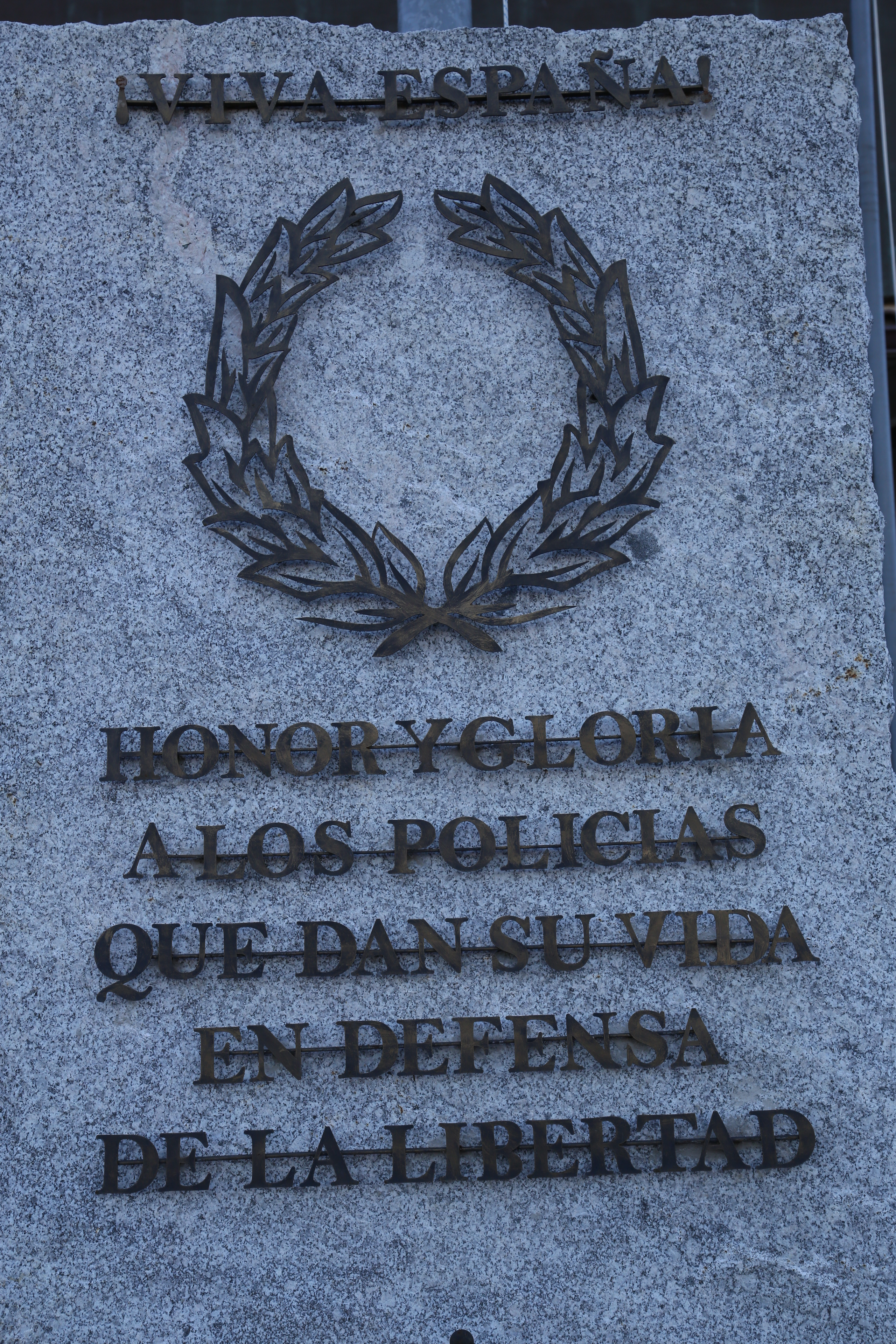 Lema caidos